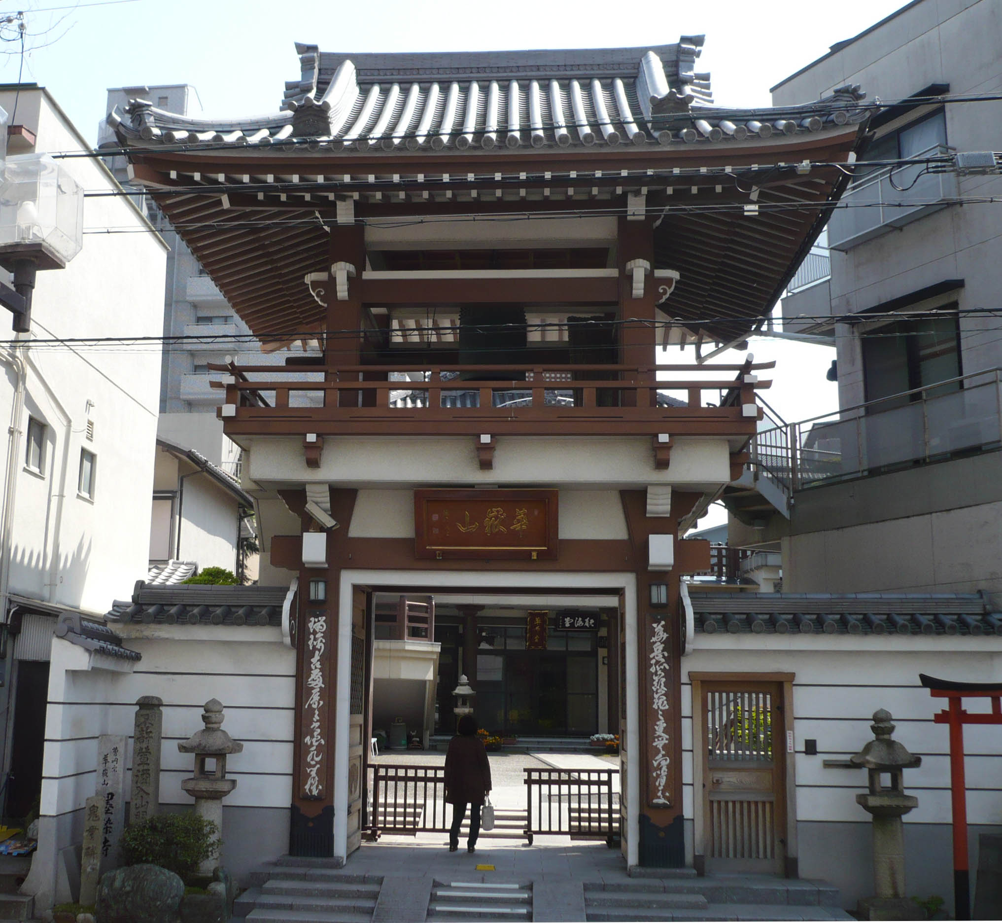 山門と鐘塔